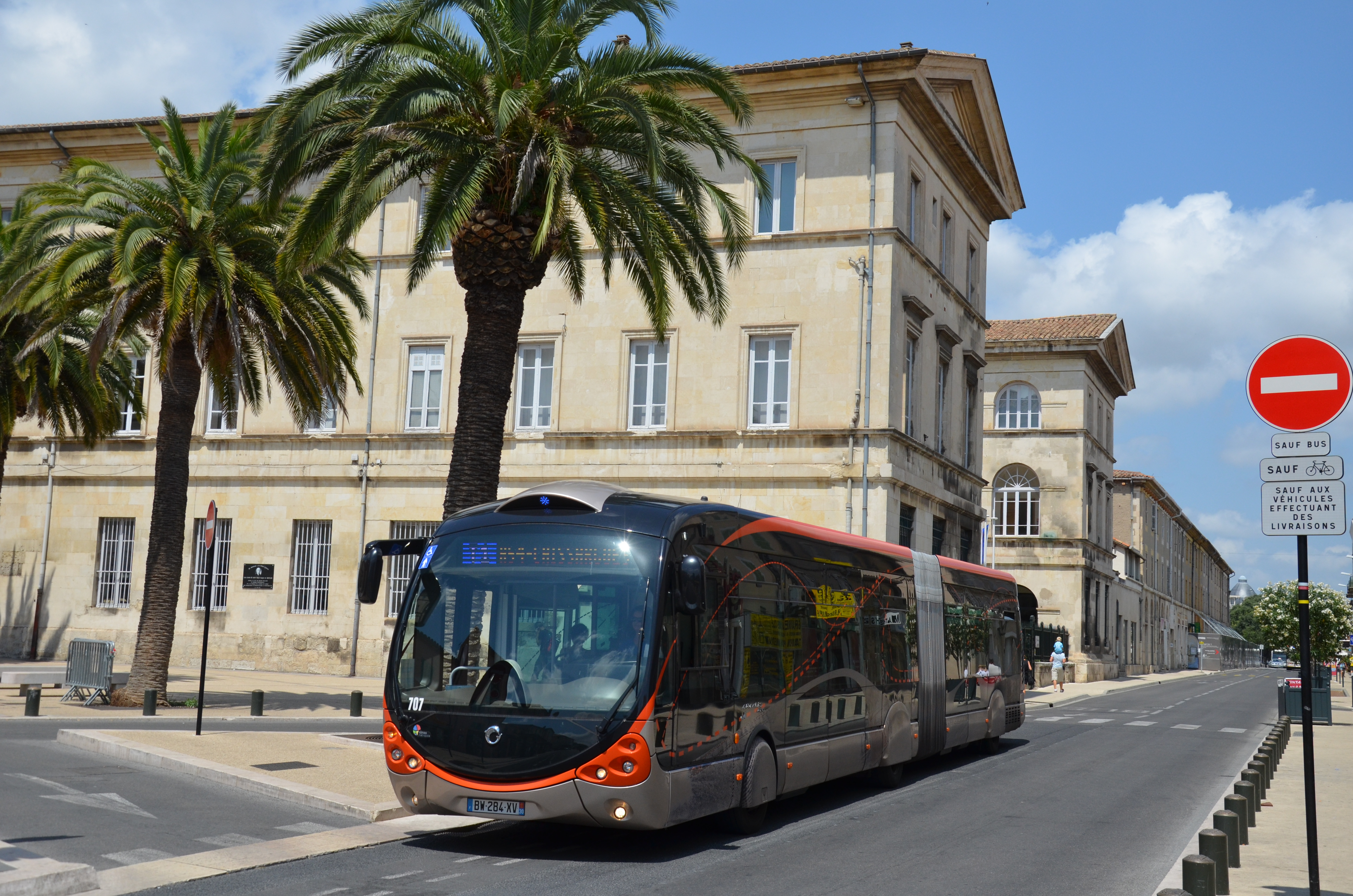 Irisbus Crealis Neo 18 n°707 de la ligne T1 du réseau TANGO, près de l'arrêt Montcalm à Nîmes.